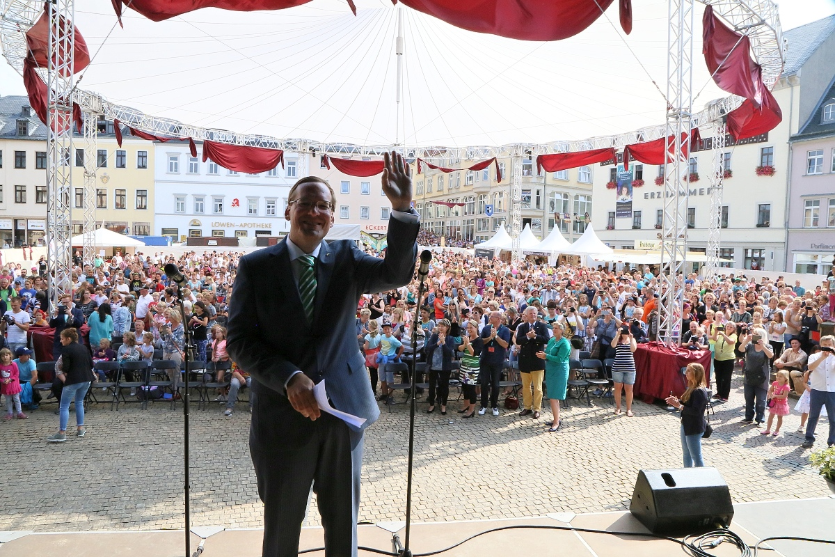 Filip Albrecht bei der Closing Gala des Festivals Fabulix